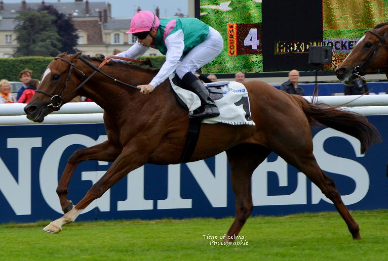 New bay